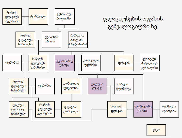 ფლავიუსების ოჯახის გენეალოგიური ხე